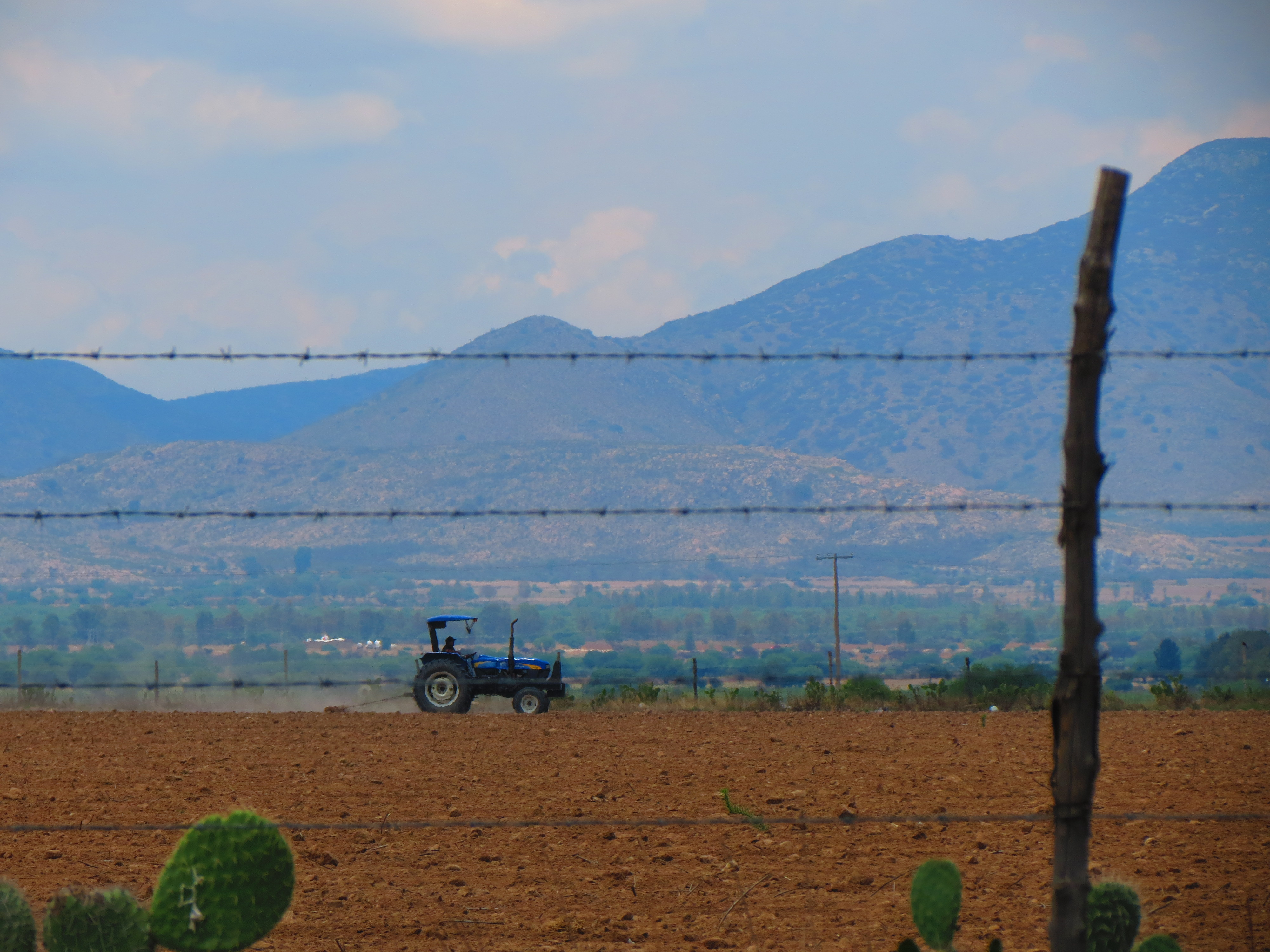 Tractor labrando la tierra en Santa Rosa comunidad del municipio de El Llano, Aguascalientes